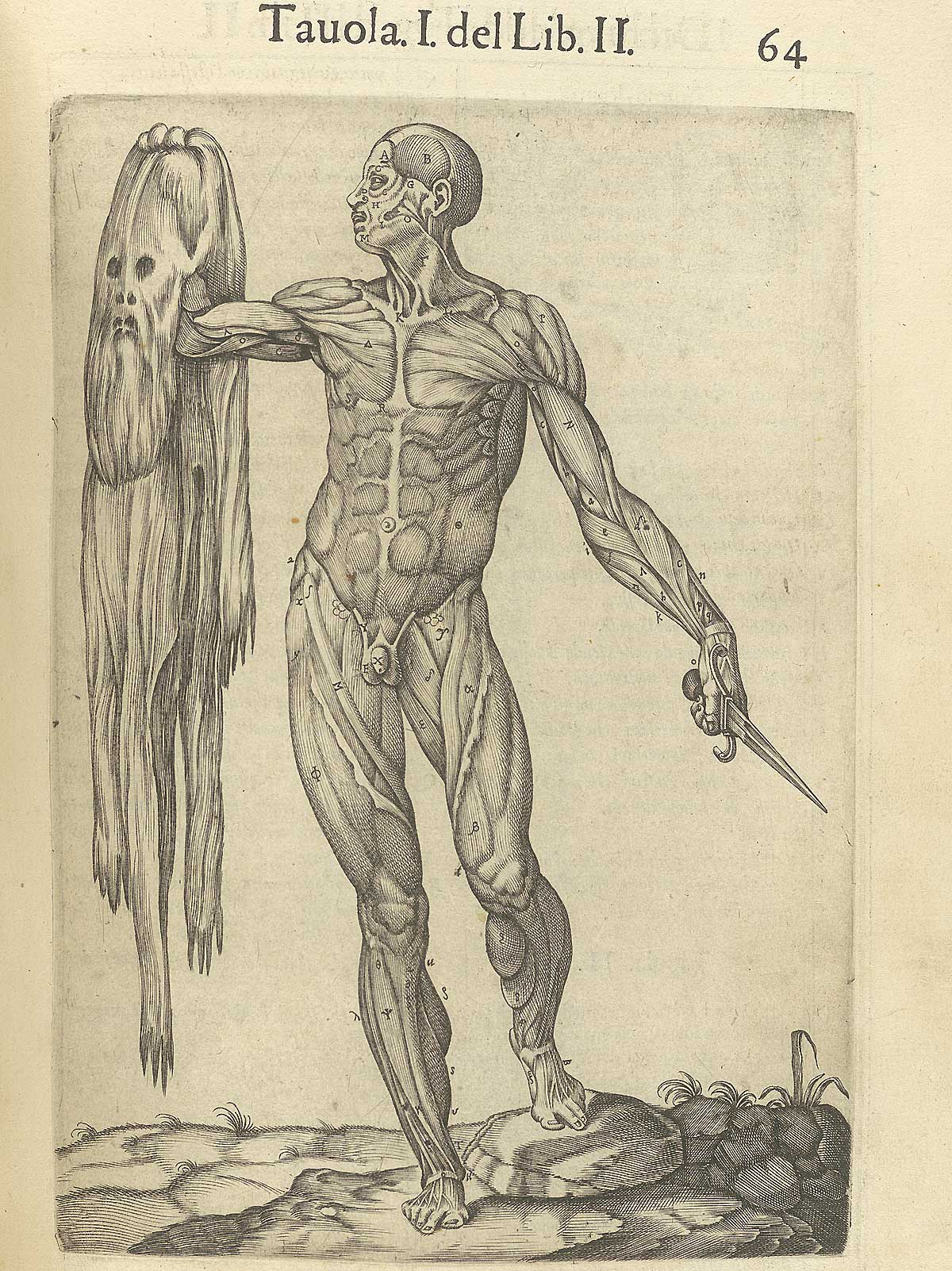 Lámina de la "Historia de la composición del cuerpo humano", Roma, 1560, página 64.